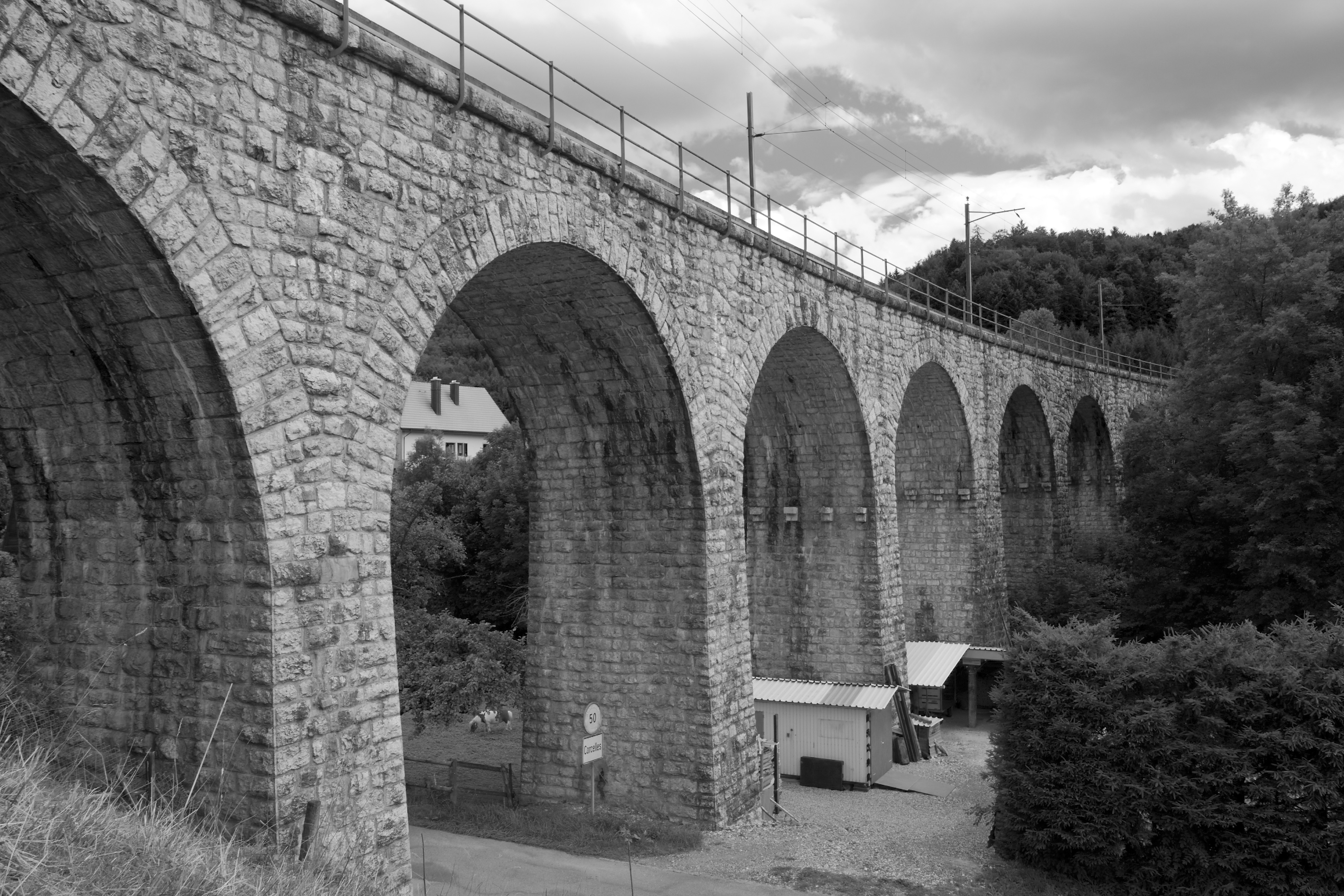 Eisenbahnviadukt zwischen Corcelles und Crémines, Schweiz